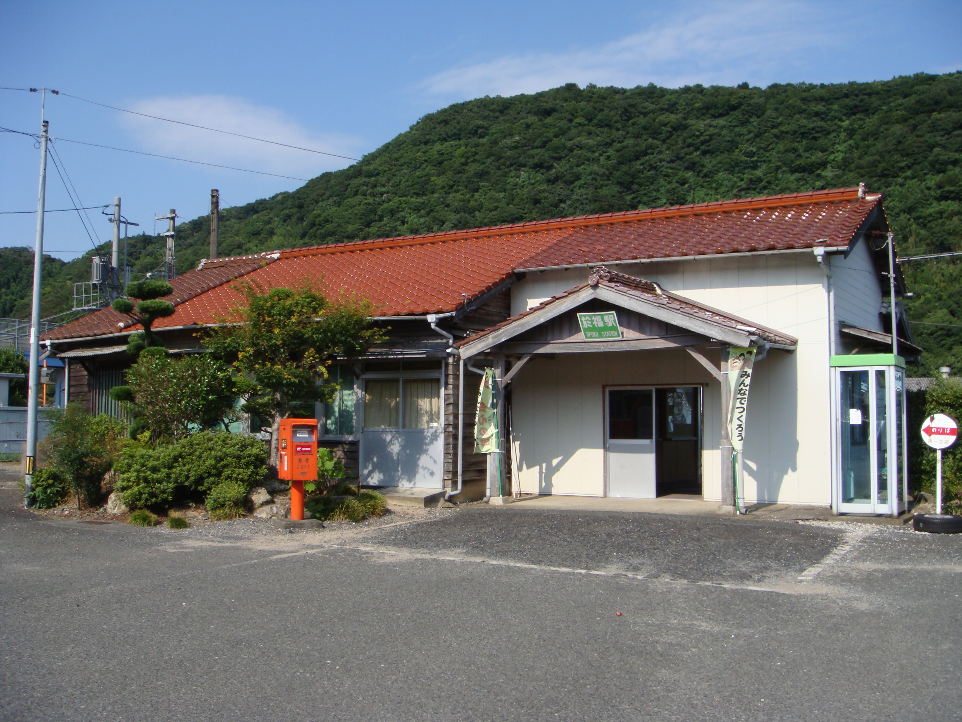 於福駅舎(2008.07.26に投稿者が撮影)